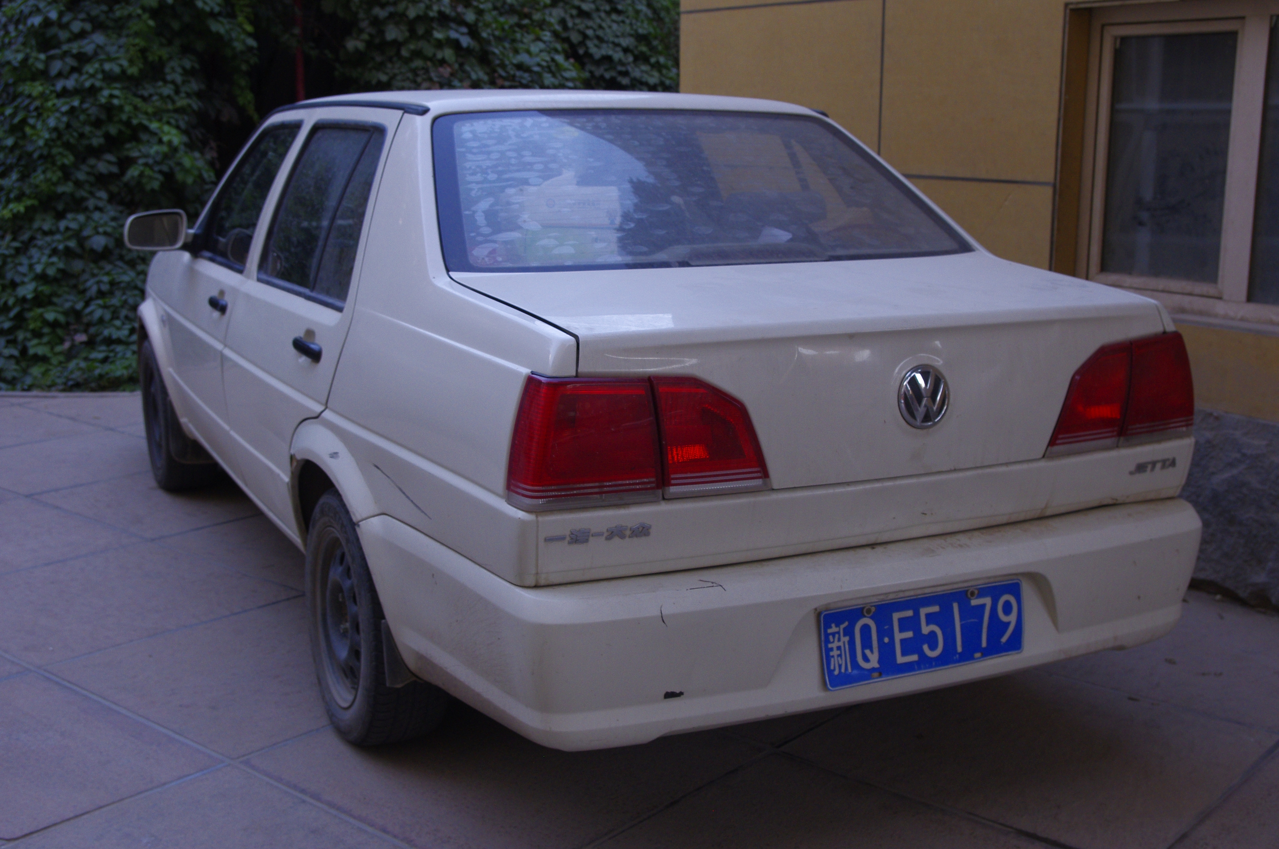 The making of this document was supported by Wikimedia Polska. To zdjęcie zostało wykonane podczas Wikiwyprawy 2015.Wszystkie zdjęcia z wyprawy możesz zobaczyć w kategorii: Wikiwyprawa 2015. English | polski | +/− To zdjęcie zostało załadowane dzięki współpracy z firmą Hyperbook. polski | +/− To zdjęcie zostało załadowane dzięki współpracy z firmą: Kopex Group. English | polski | +/−